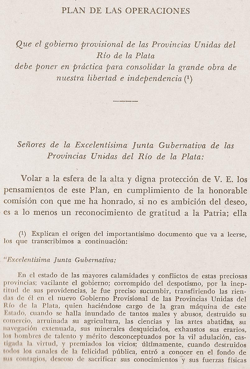 Primer página del "Plan de Operaciones, programa de gobierno de la Primera Junta